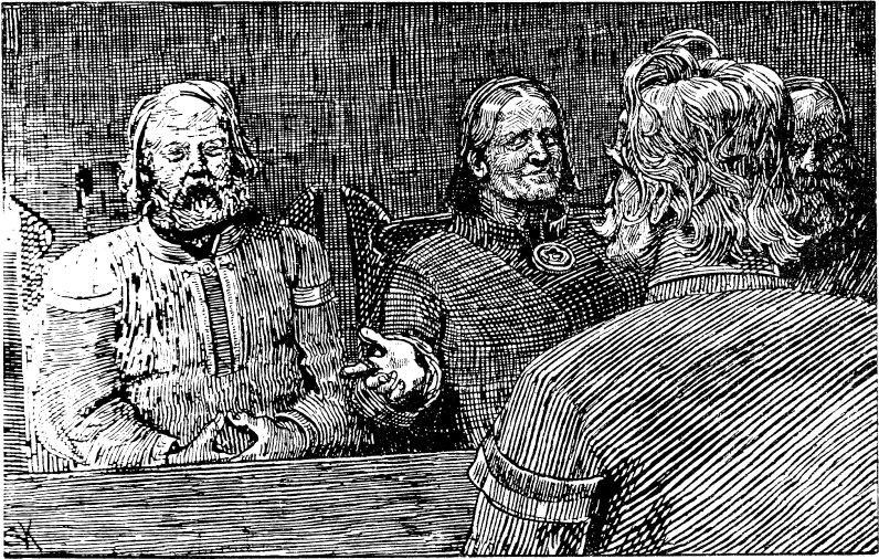 Christian Krohg: Illustration for Olav den helliges saga, Heimskringla 1899-edition. «Sigurd Syr, Åsta, Olav og Rane.»